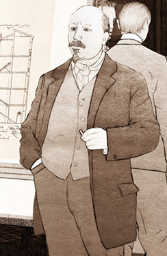 Imatges del Museu Valencià d'Etnologia (Andrés Marín Jarque) sobre la Plaça de Bous de València.